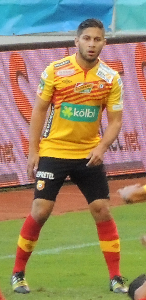 Esta obra de Luis Manuel Madrigal está bajo una licencia de Creative Commons Reconocimiento-CompartirIgual 4.0 Internacional. Para una versión sin logo escriba a